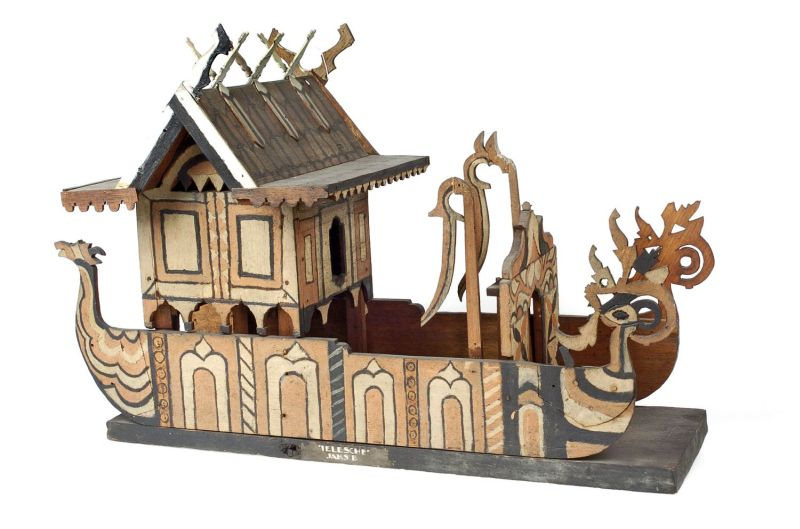 Huismodel. Lichamen werden vaak jaren lang opgenomen in een dodenhuis buiten de nederzetting. Na een tijd, als er genoeg geld is verzameld voor het vieren van het grote dodenfeest, tiwah, waarbij zielen geacht werden naar het zielenland te vertrekken m.b.v. priesterlijke bemiddeling, worden de beenderen van de overledene in een doek gewikkeld en opgenomen in een knekelhuisje of een grote aardewerken pot, beide op een paal geplaatst.. Model van een zielenschip of geestenhuisje